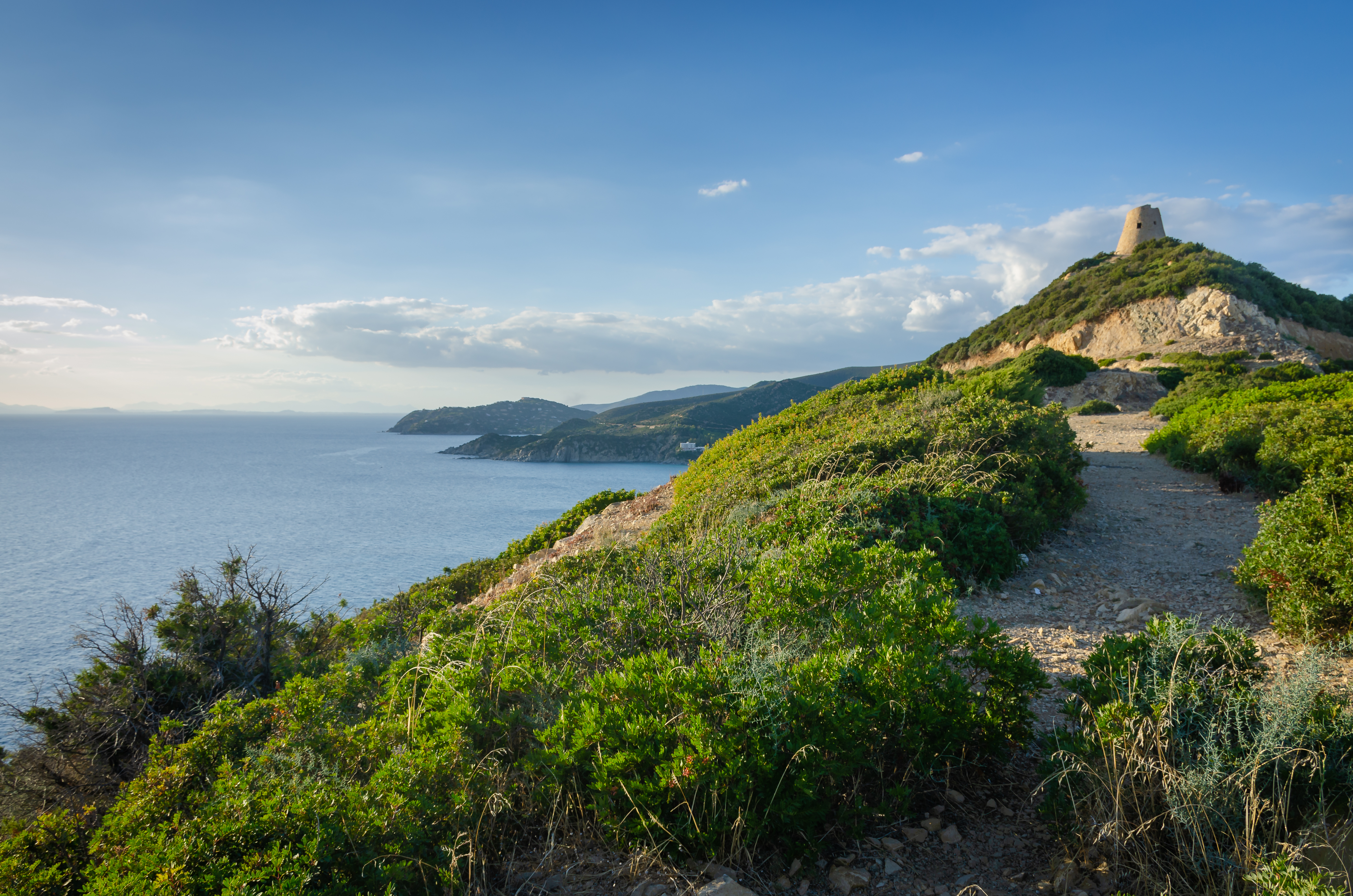 Capo Boi bei Sinnai, Sardinien